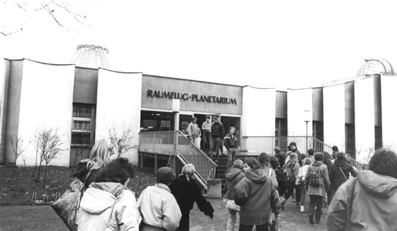 Halle, Raumflug-Planetarium ADN-ZB Lehmann 1.12.88 Halle: Das Raumflug-Planetarium "Sigmund Jähn" auf der halleschen Peißnitzinsel ist die größte schulastronomische Einrichtung der DDR. Es unterstützt den Astronomieunterricht der 10. Klassen, beherbergt verschiedene astronomische Arbeitsgemeinschaften und ist Aus- und Weiterbildungsstätte für Astronomielehrer. Für ausländische Interessenten - bisher kamen sie aus über 40 Ländern - bietet es Programme in neun Sprachen. Ursprünglich vom Kombinat Carl Zeiss Jena als Referenzobjekt Planetarium für ausländische Besucher der Leipziger Messe gedacht.